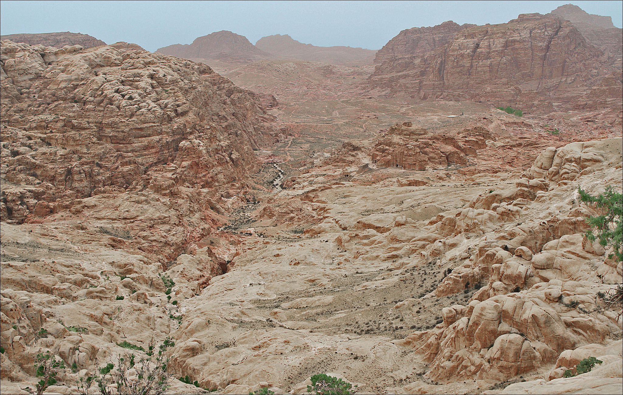 Vue du wadi Musa et son parcours vers la vallée.